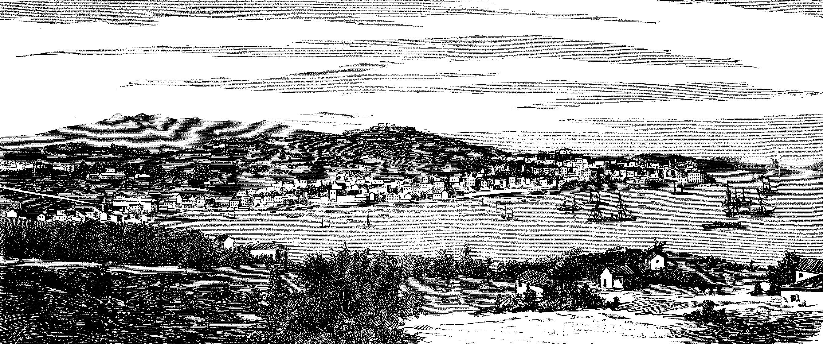 "VIGO.—VISTA GENERAL DE LA CIUDAD Y DEL PUERTO, VISITADOS POR S. M. EL 2 DEL ACTUAL. (De fotografía remitida por el Sr. Bocconi.)"